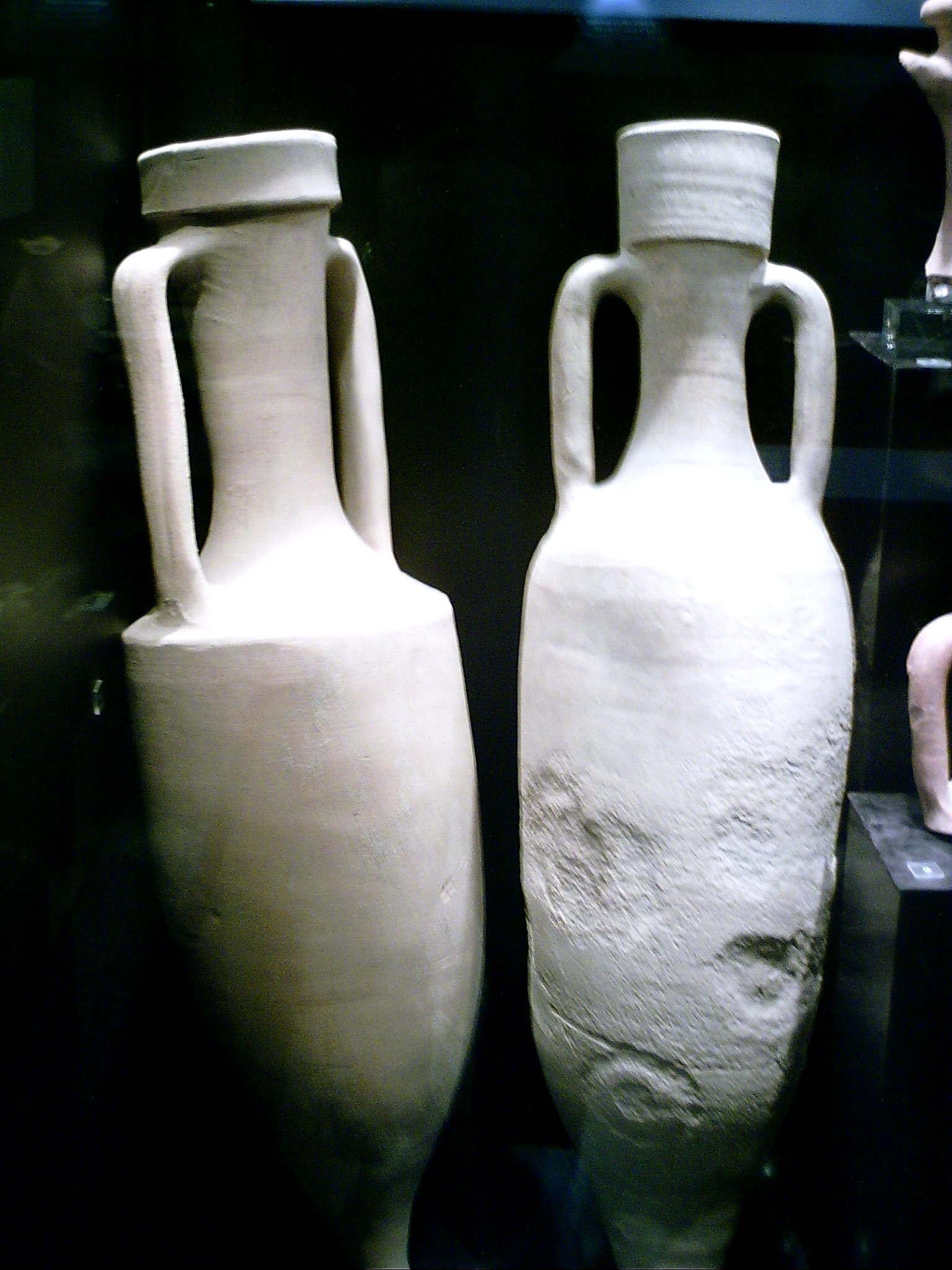 Àmfores de vi de l'época romana, al Museu de Badalona, Badalona, Barcelonès, (Catalunya).